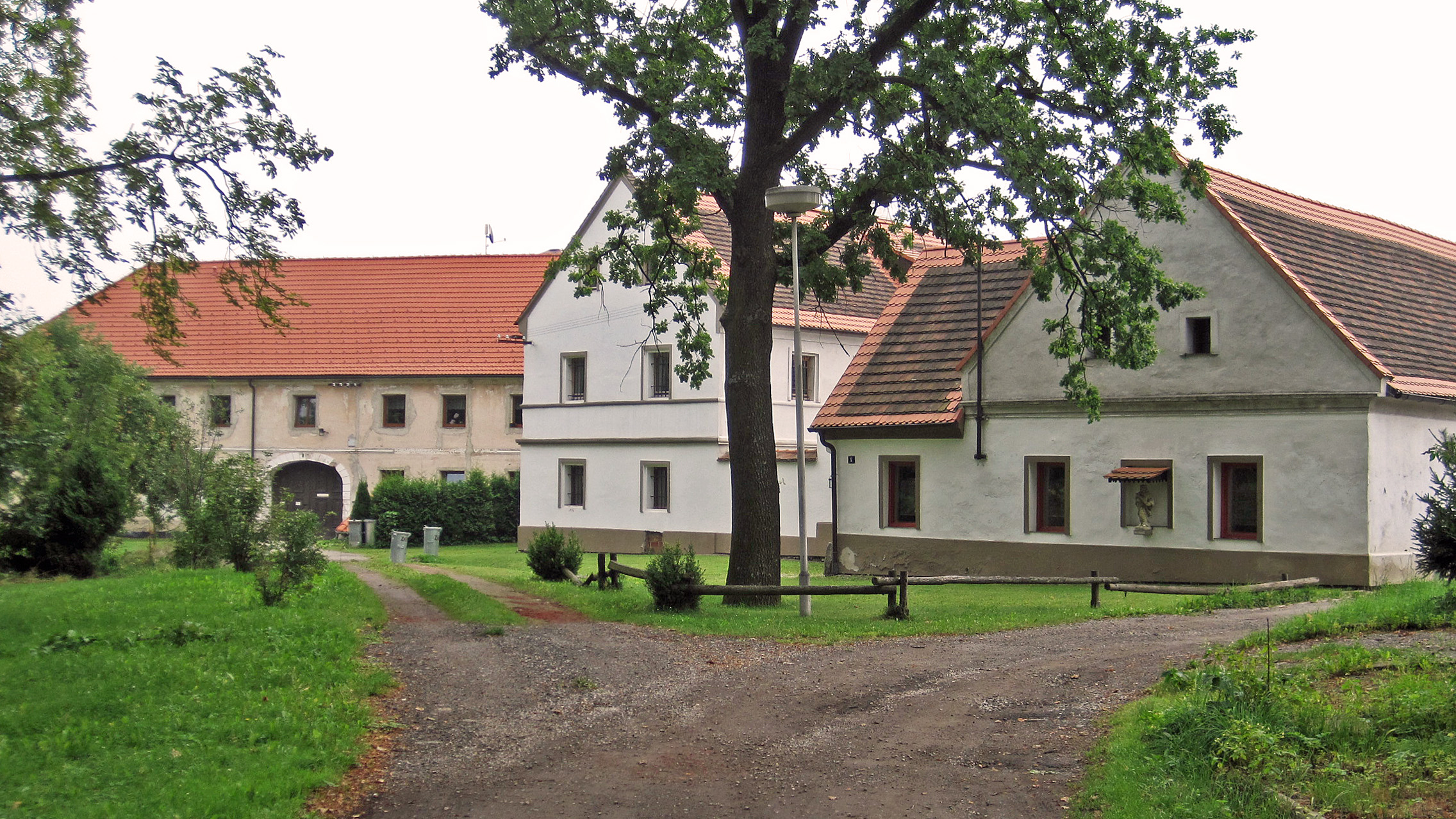 Zahrádka - čp. 21 a 4 (statek vlevo vzadu) a čp. 5 (dvojdům vpravo)